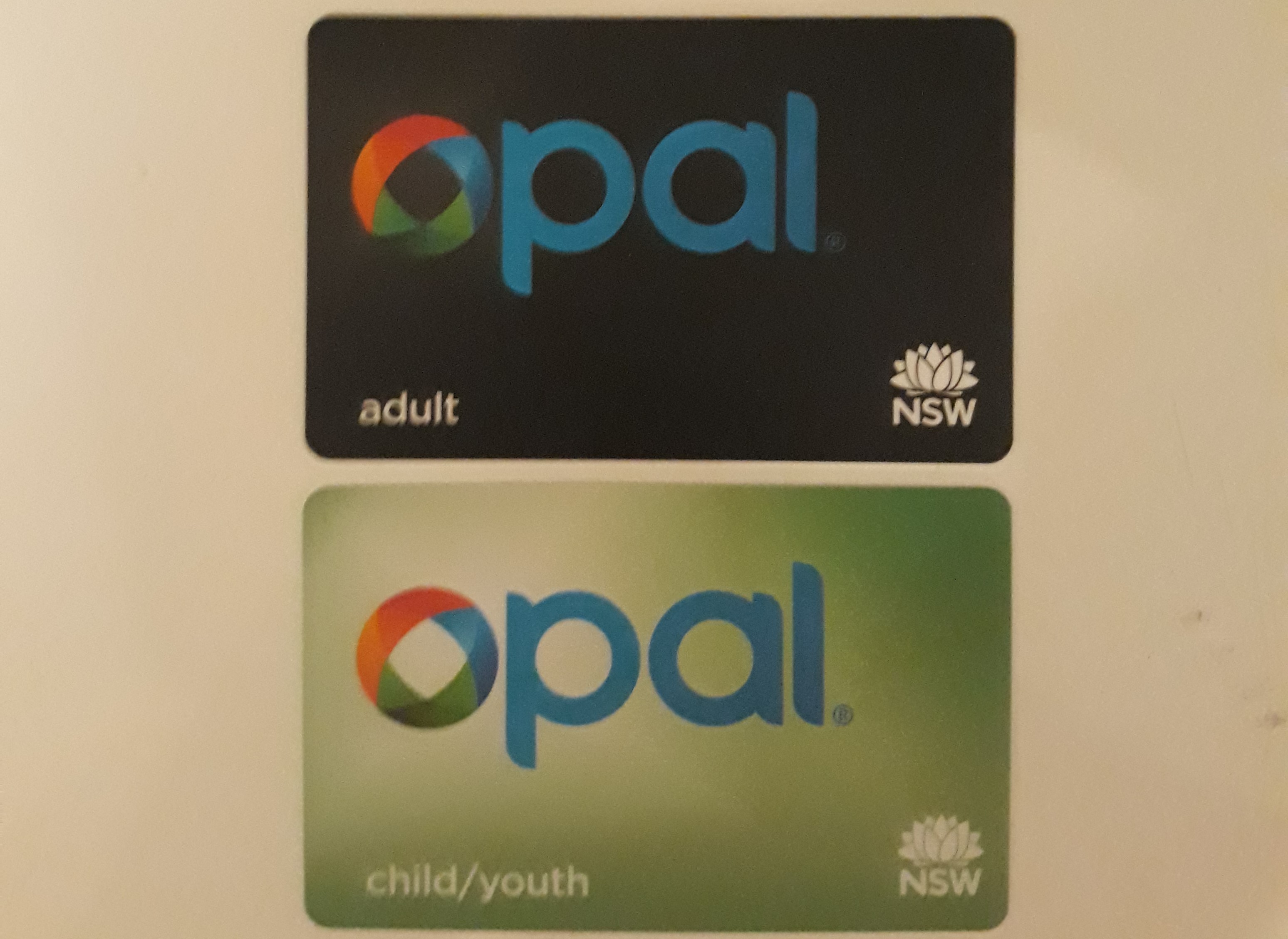 Helduen eta umeen Opal txartelak